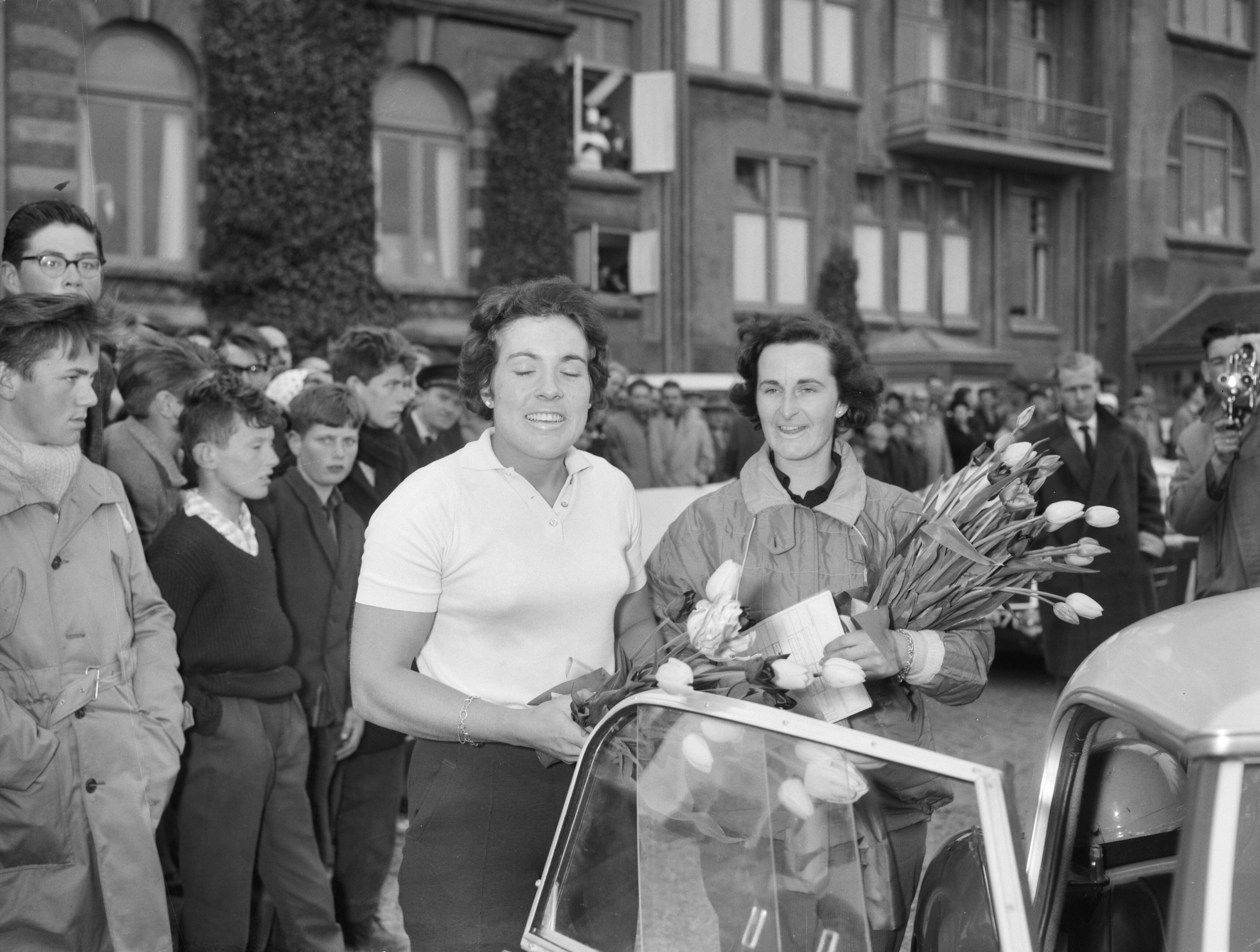 Collectie / Archief : Fotocollectie Anefo Reportage / Serie : [ onbekend ] Beschrijving : Finish van de Tulpenrallye te Noordwijk. Pat Moss (links) en haar bijrijdster Ann Wisdom in een Austin Healy Datum : 5 mei 1961 Locatie : Noordwijk Trefwoorden : autorally's, autosport, sport Persoonsnaam : Moss, Pat, Wisdom, Ann Fotograaf : Bilsen, Joop van / Anefo Auteursrechthebbende : Nationaal Archief Materiaalsoort : Negatief (zwart/wit) Nummer archiefinventaris : bekijk toegang 2.24.01.04 Bestanddeelnummer : 912-4503